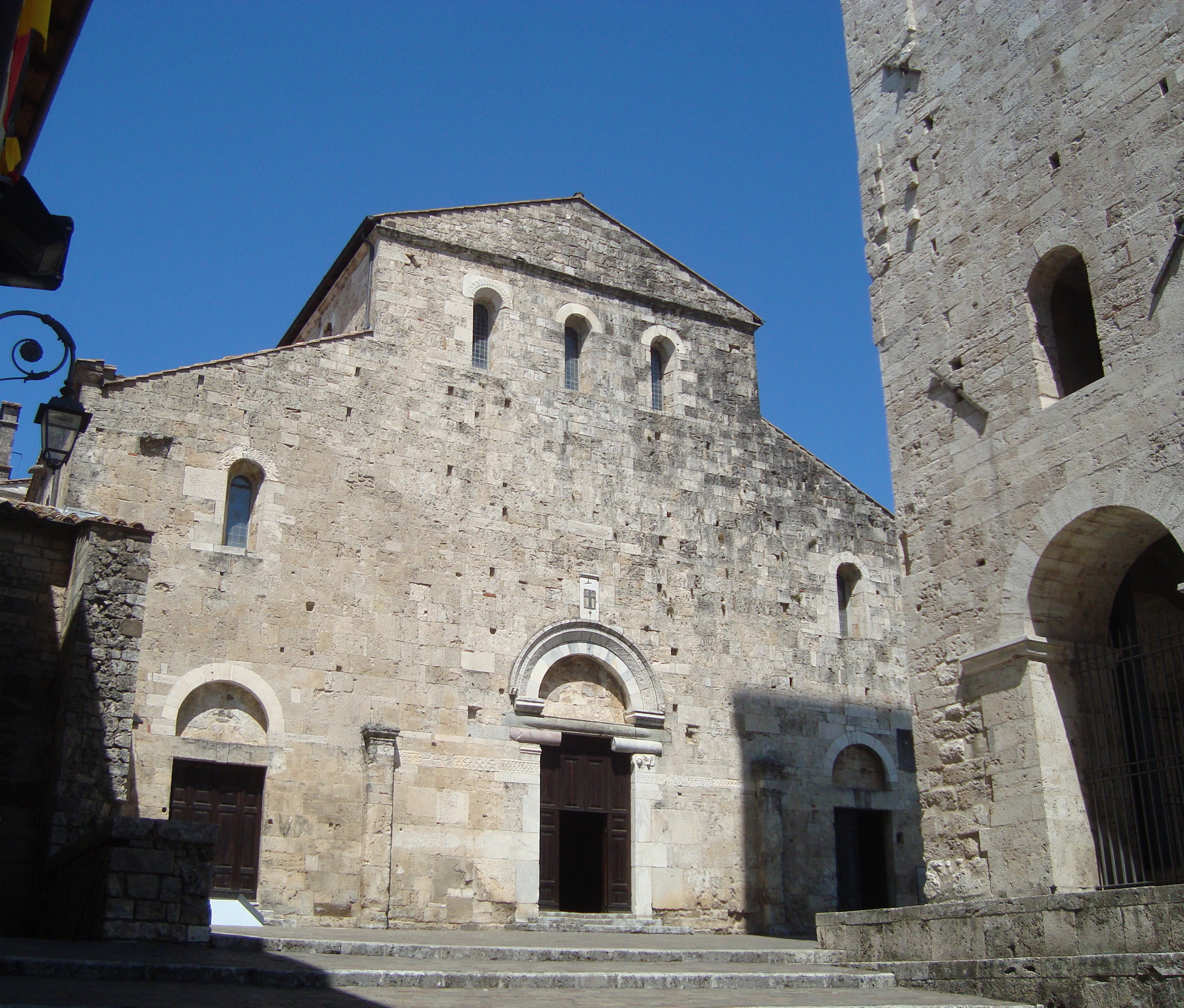 Facade de la cathédrale Santa Maria d'Anagni